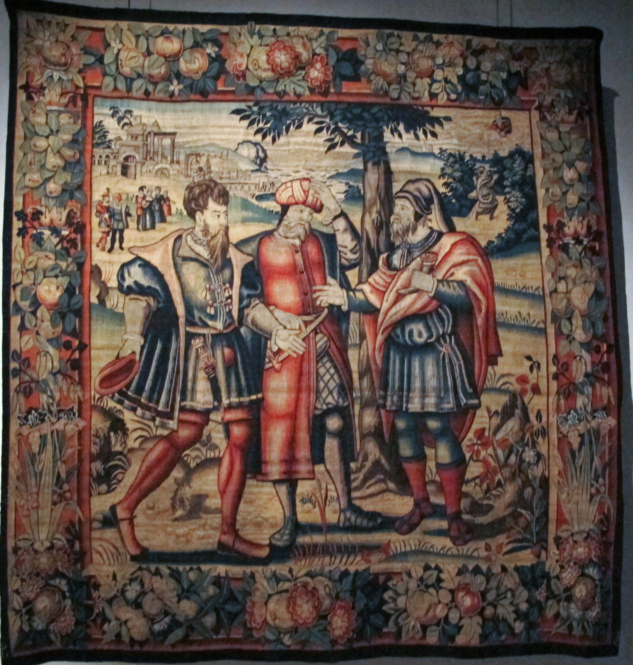 Gruuthuse, arazzo con storia di david, 1550-1599 ca